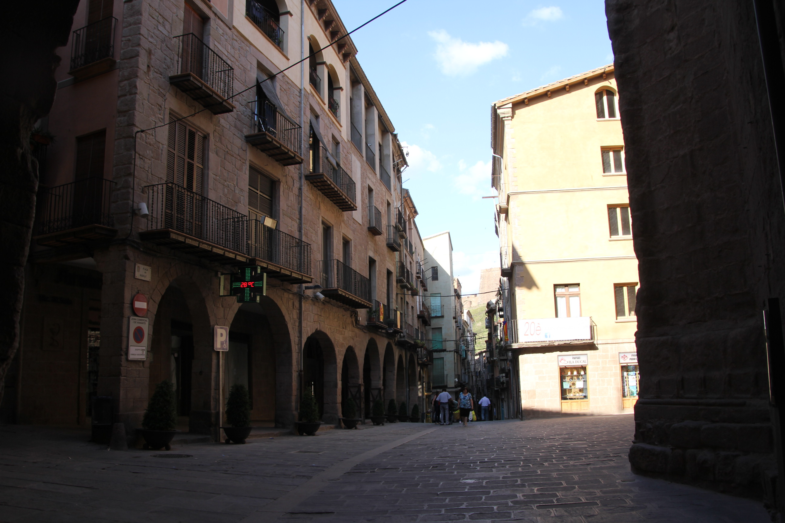 Plaça del Mercat (Cardona)